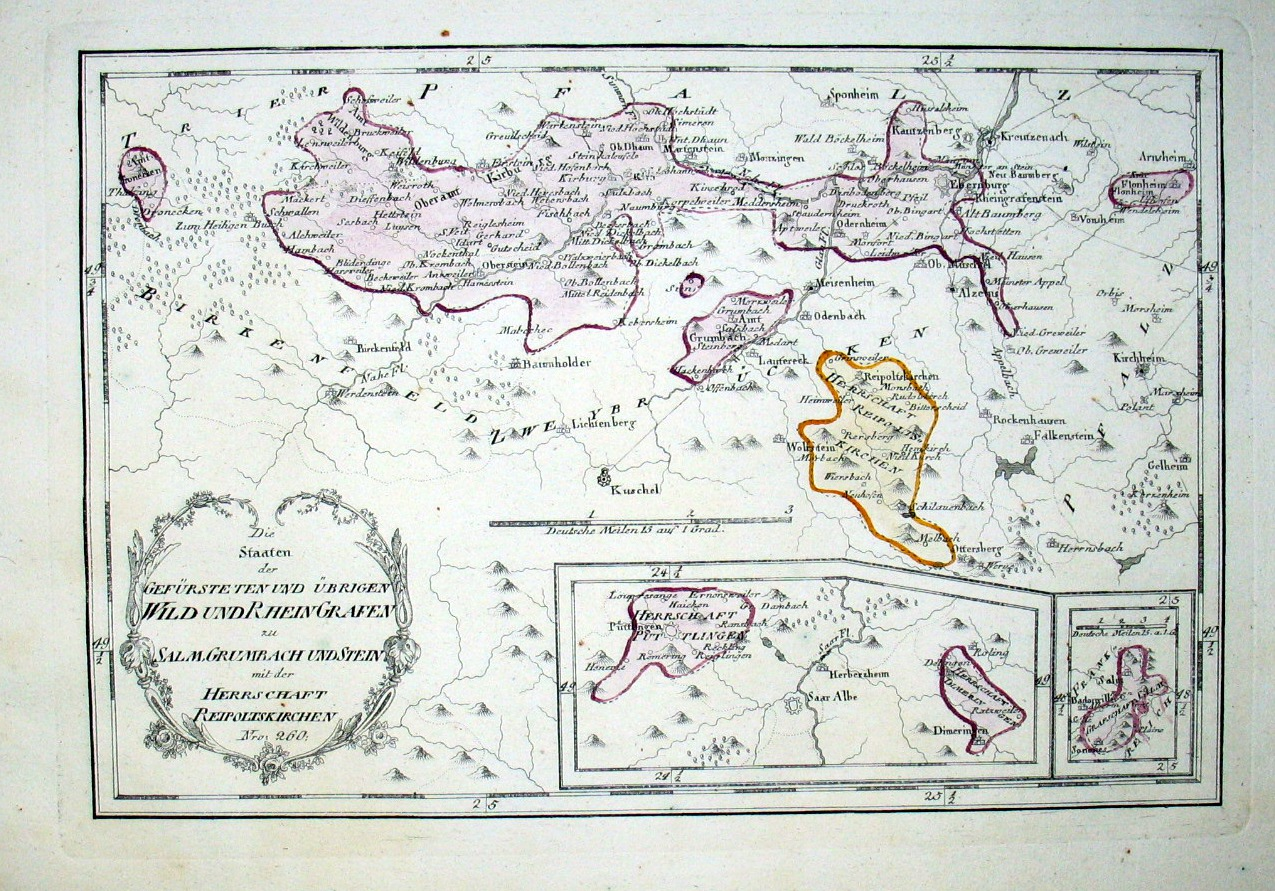 Die Staaten der Gefürsteten und übrigen Wild- und Rhein-Grafen zu Salm, Grumbach und Stein mit der Herrschaft Reipoltskirchen. Nro. 260. Kolorierter Kupferstich